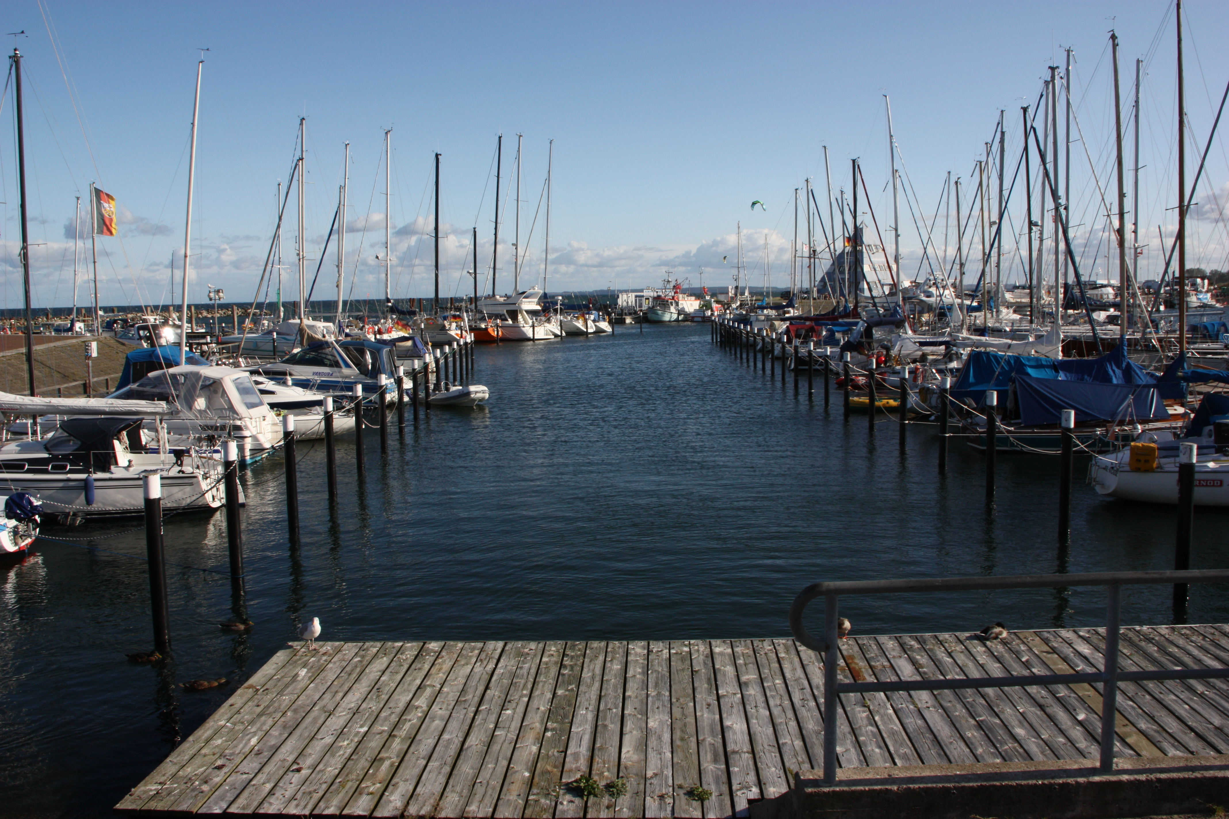 Hafen Ostseebad Damp 2009